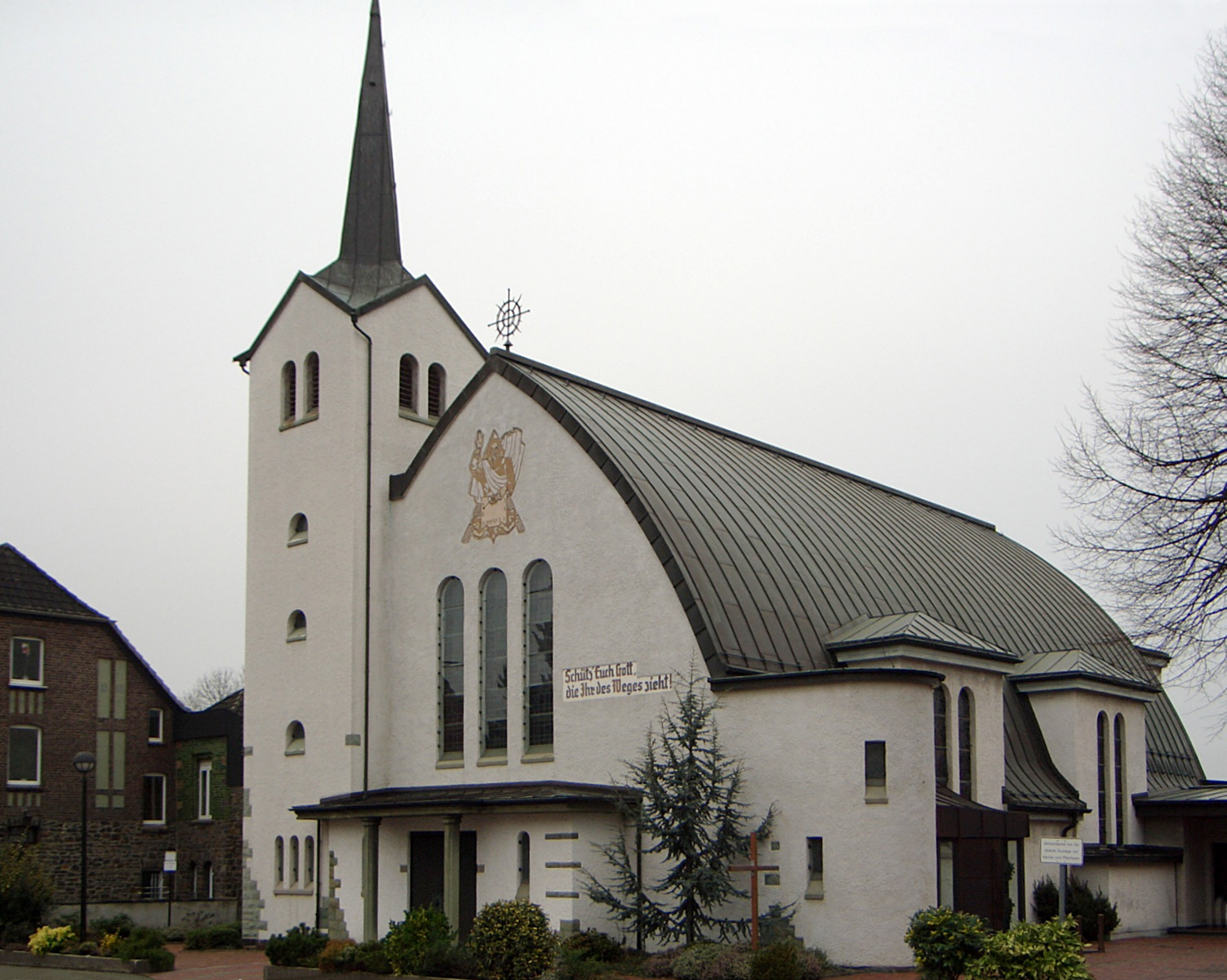 Katholische St. Marien Kirche Massen